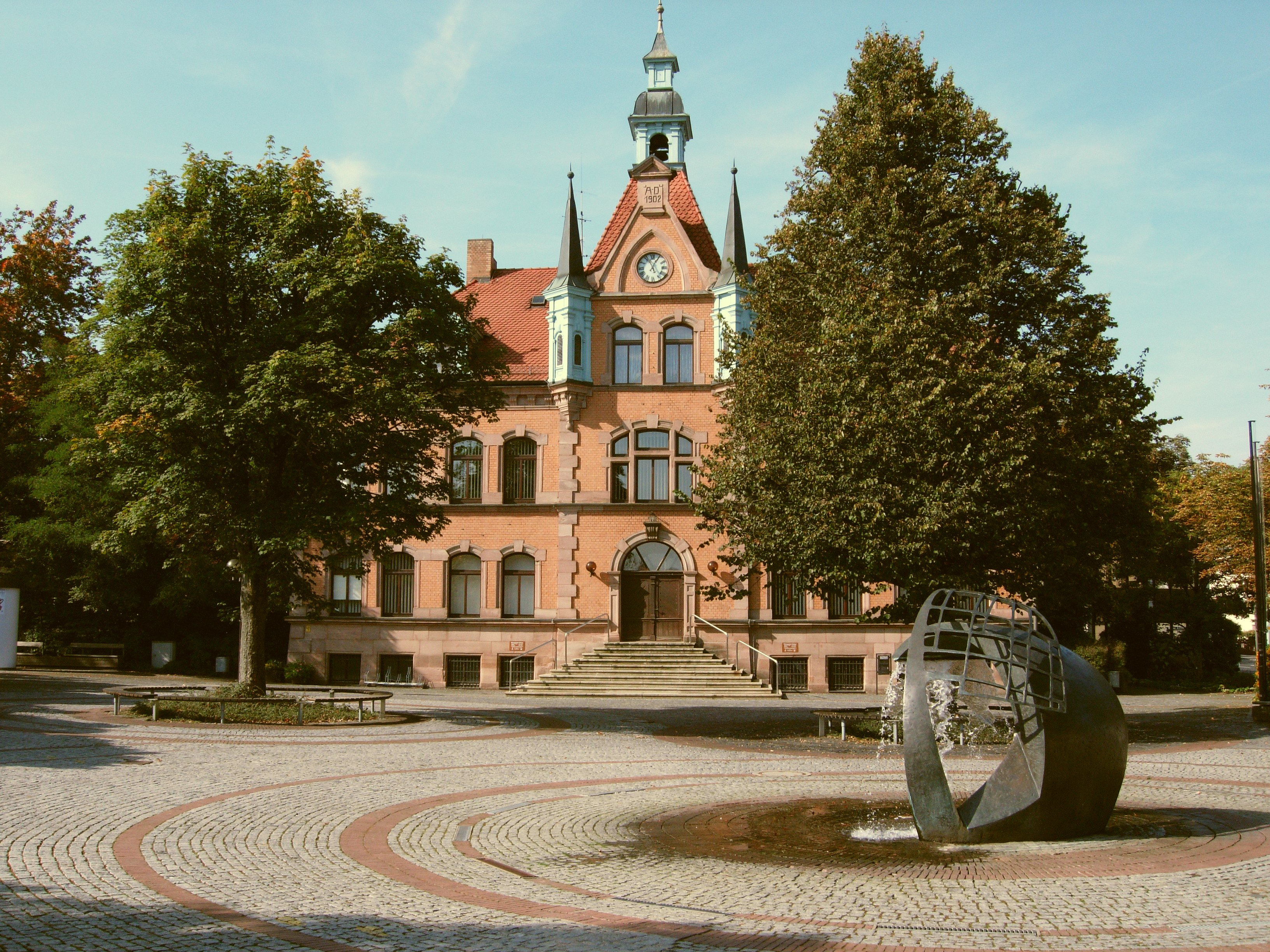 Rathaus von Röthenbach an der Pegnitz